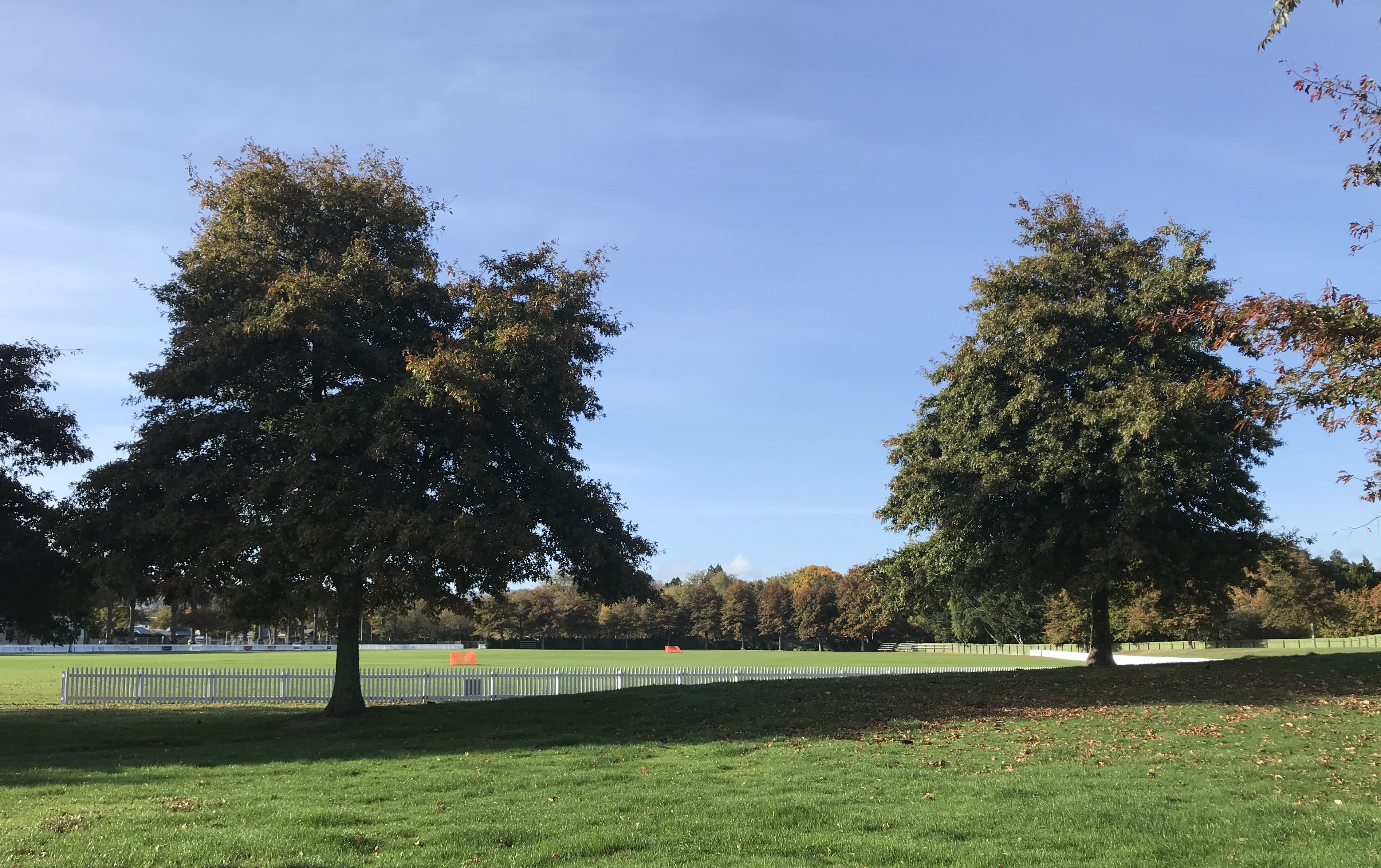 Fitzherbert Park